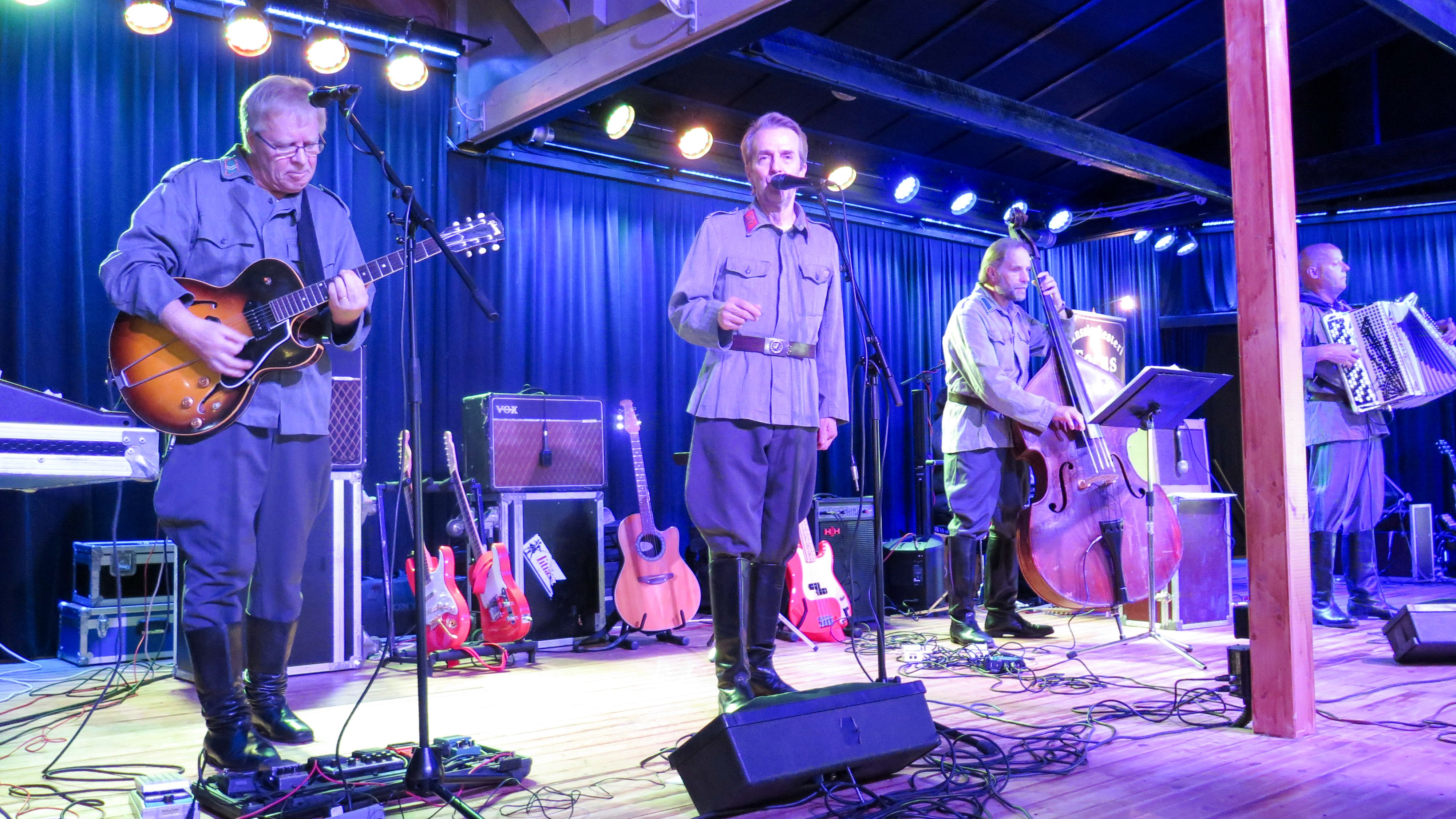 Korsuorkesteri suomalainen tanssiorkesteri